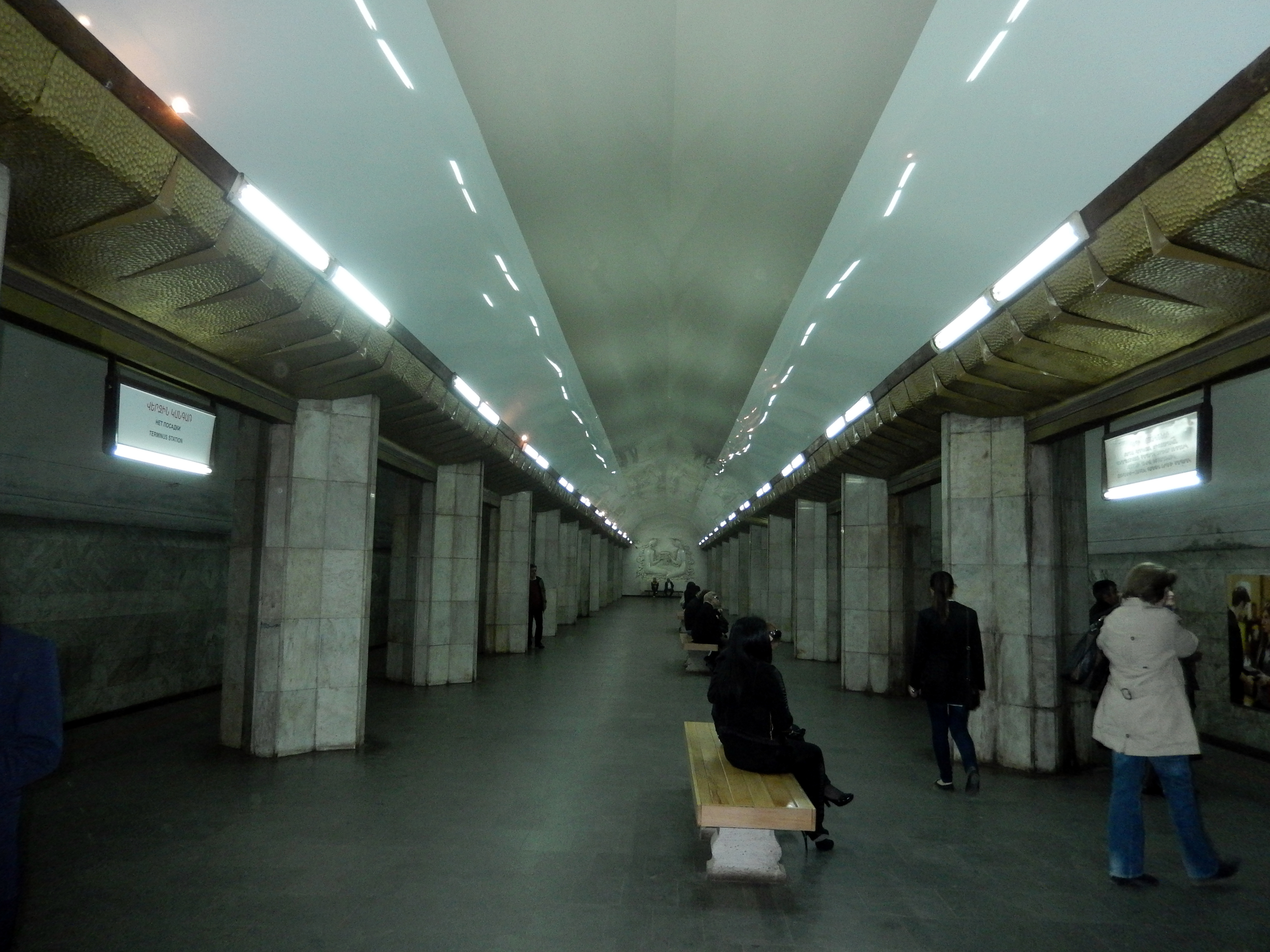 Բարեկամություն (մետրոյի կայարան)